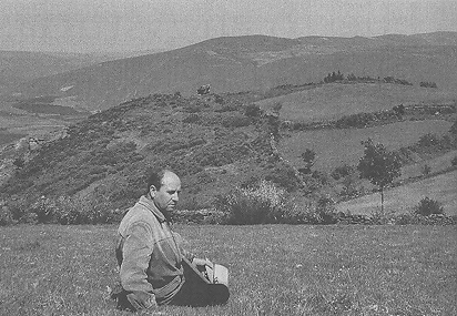 José Manuel González y Fernández-Valles